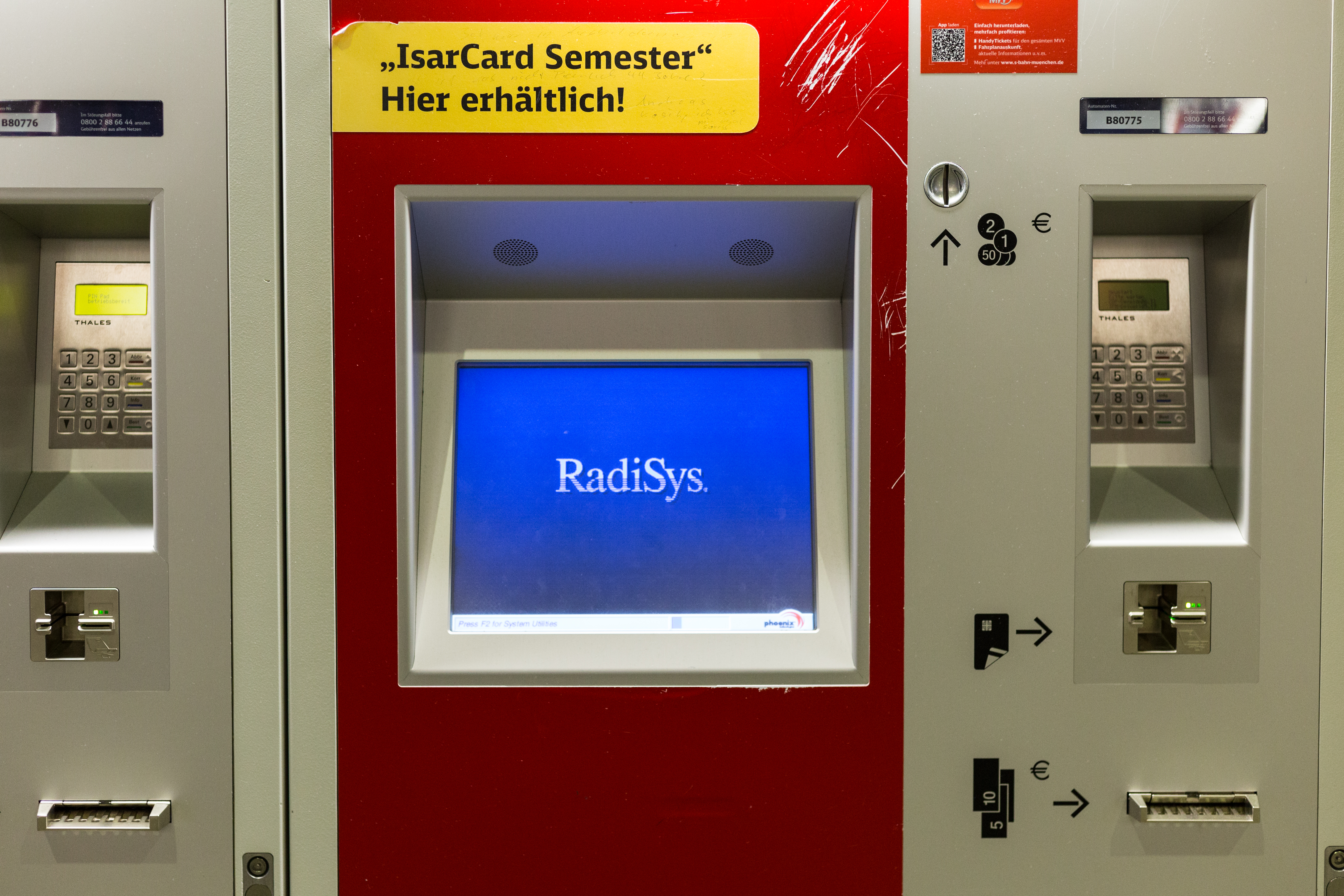 Ein Ticketautomat der Deutschen Bahn, aufgrund der WannaCry Attacke derzeit außer Betrieb.